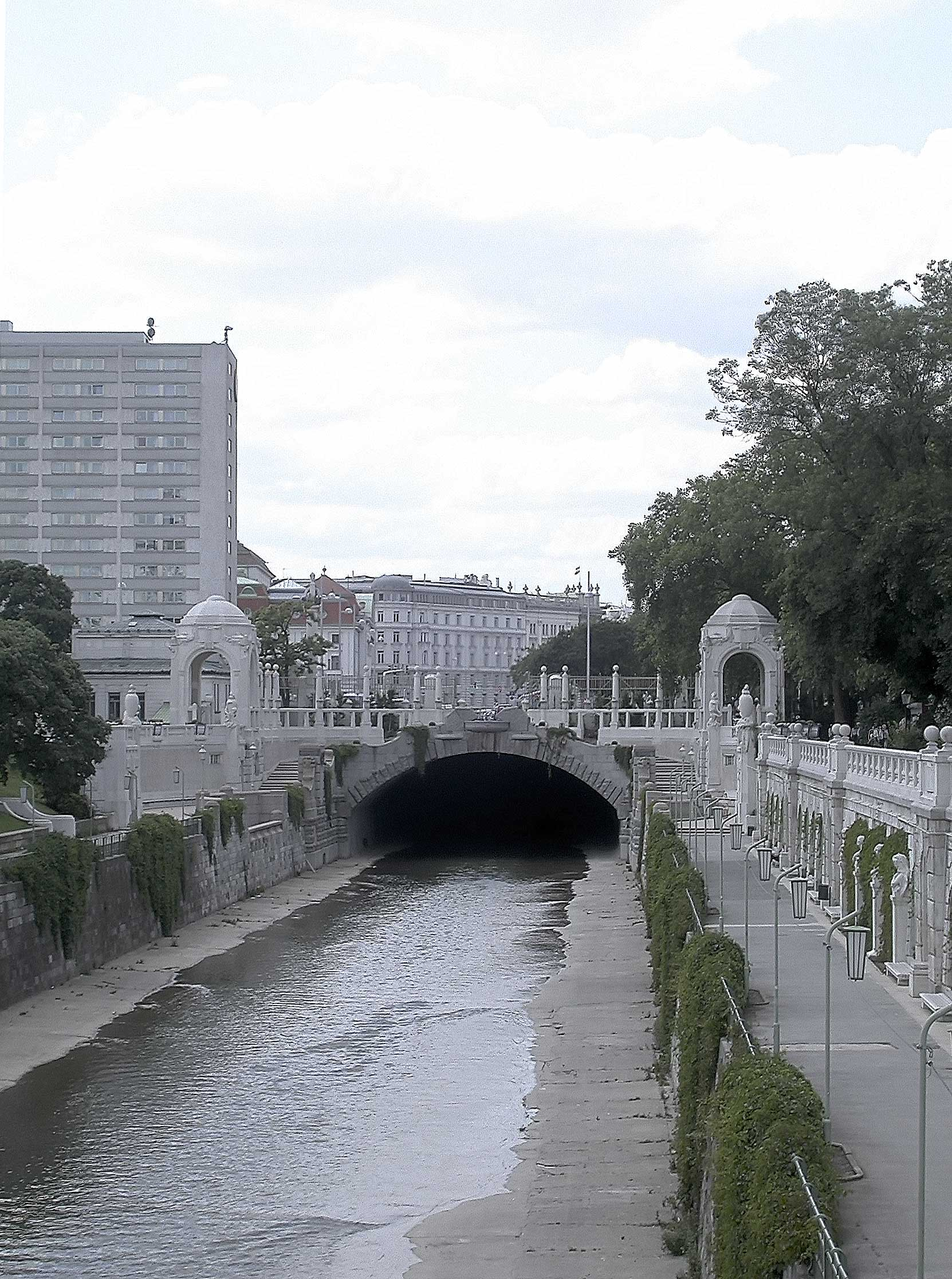 Das Wienflussportal im Stadtpark Tag, Sommer, Blick in Richtung Westen